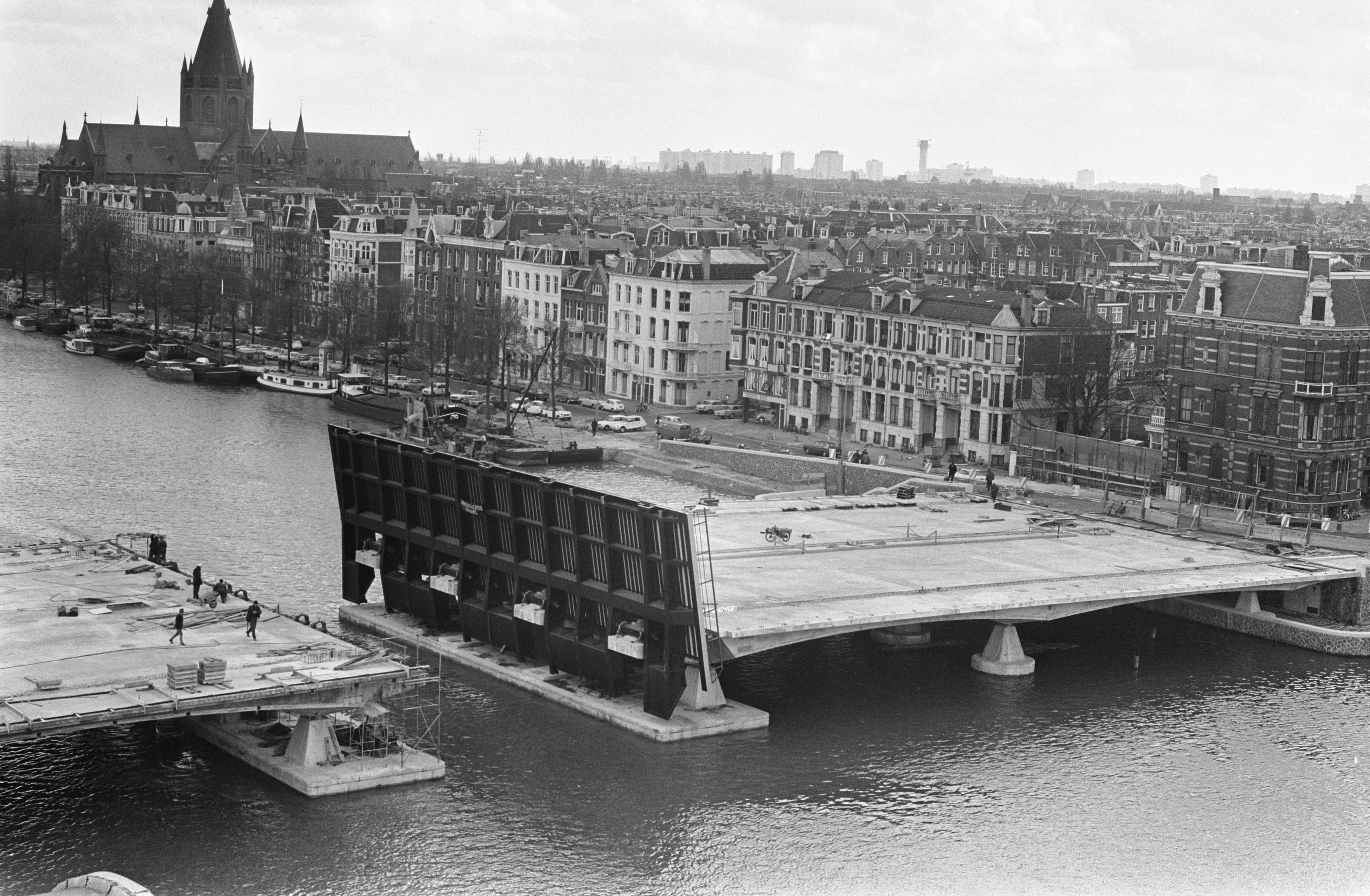 Collectie / Archief : Fotocollectie Anefo Reportage / Serie : [ onbekend ] Beschrijving : Brug over de Amstel bij Stadhouderskade, Amsterdam overzicht werkzaamheden Datum : 16 april 1969 Locatie : Amsterdam, Noord-Holland Trefwoorden : Werkzaamheden, bruggen, overzichten Persoonsnaam : Amstel Fotograaf : Mieremet, Rob / Anefo Auteursrechthebbende : Nationaal Archief Materiaalsoort : Negatief (zwart/wit) Nummer archiefinventaris : bekijk toegang 2.24.01.05 Bestanddeelnummer : 922-3039